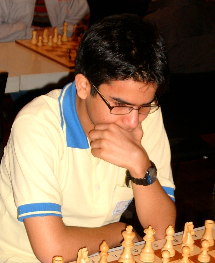 Parimarjan Negi, Indian chess grandmaster